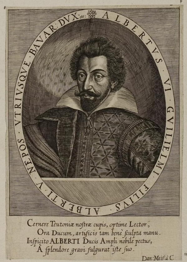 Grafik aus dem Klebeband Nr. 1 der Fürstlich Waldeckschen Hofbibliothek Arolsen Motiv: Albrecht VI. von Bayern, genannt der Leuchtenberger (1584–1666)